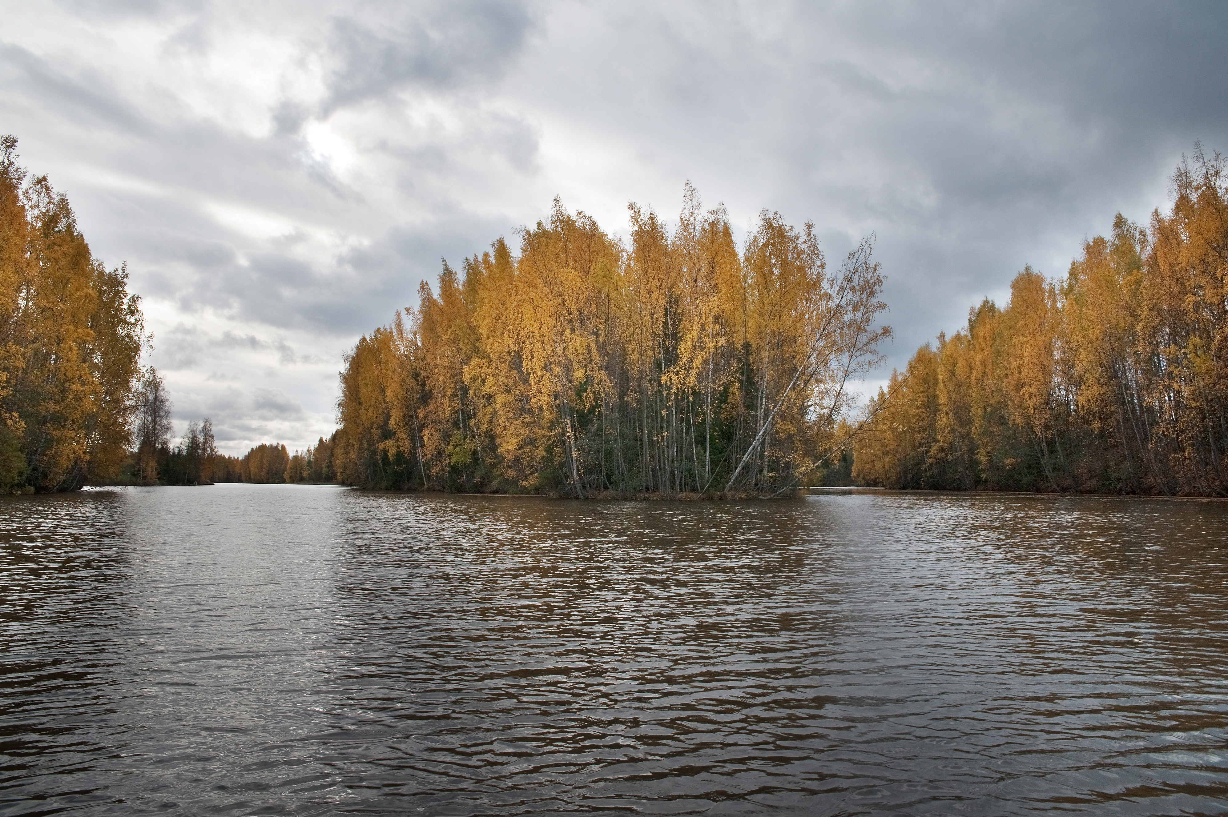 Kokemäenjoen uomia Säpilänniemen kohdalla.